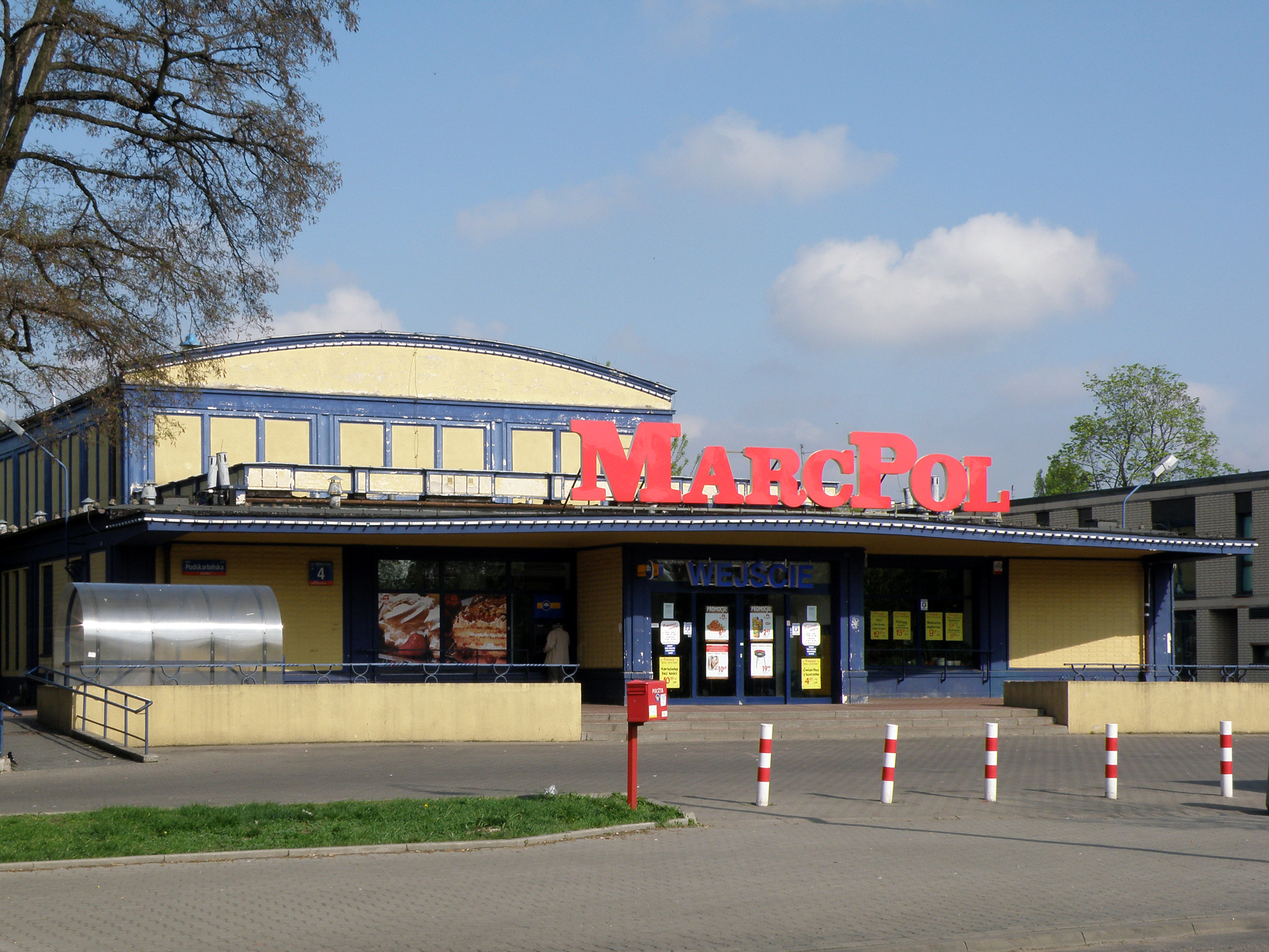 Warszawa, ul. Podskarbińska 4, MarcPol. Dawne Kino 1 Maj